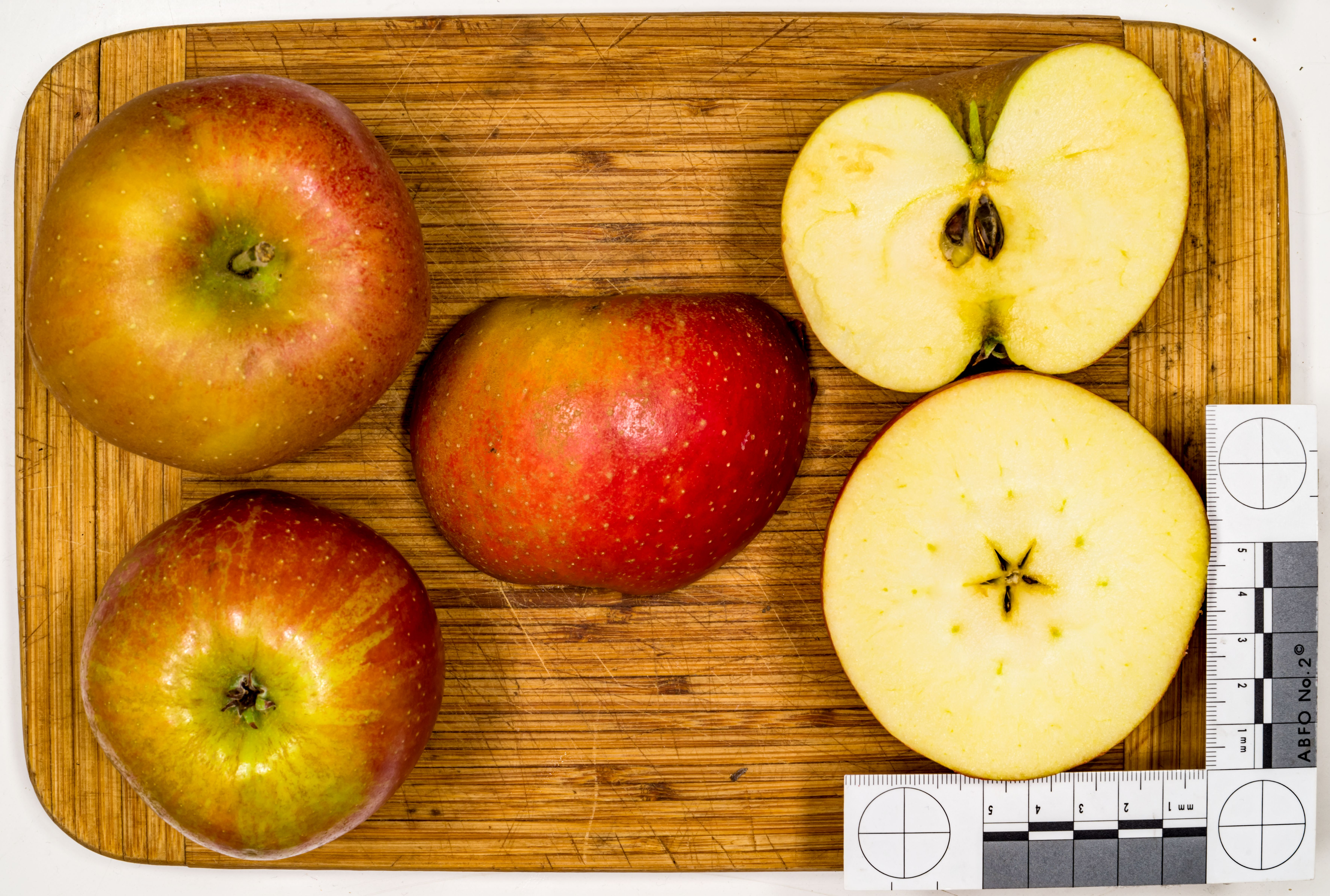 Apfelsorte: Der Schöne aus Boskoop